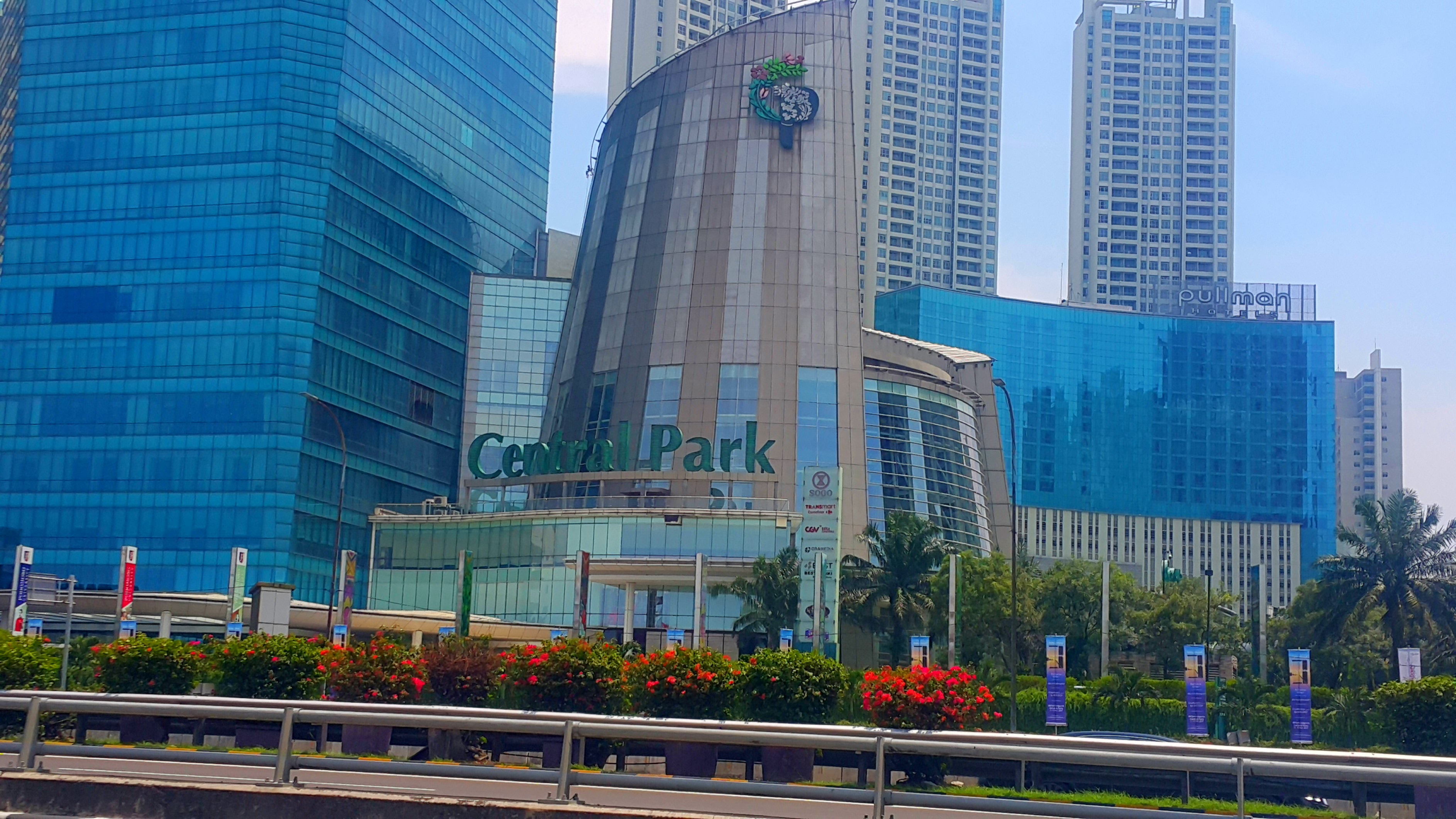 Central Park Mall, Jakarta